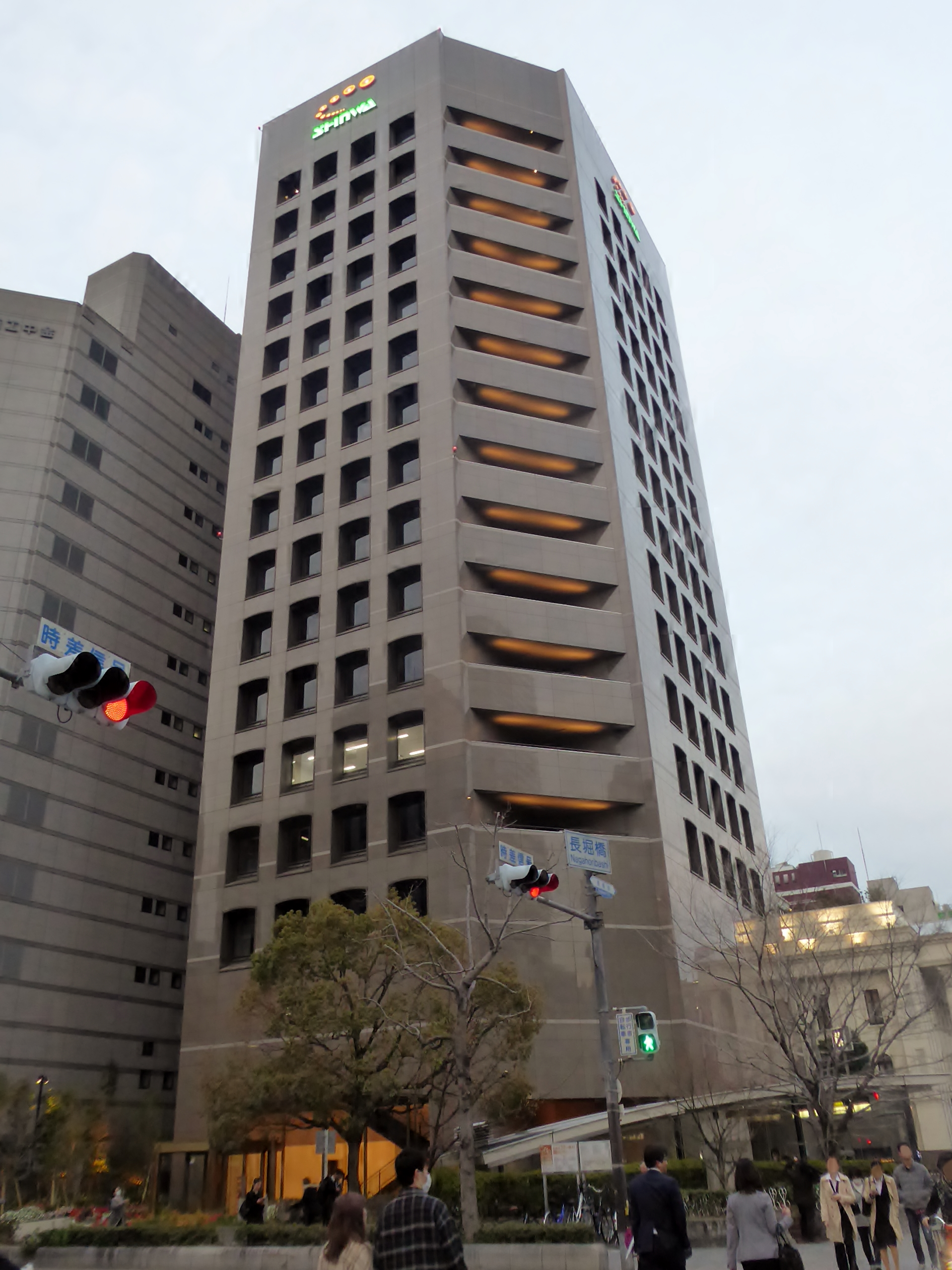 SRビル長堀を撮影。